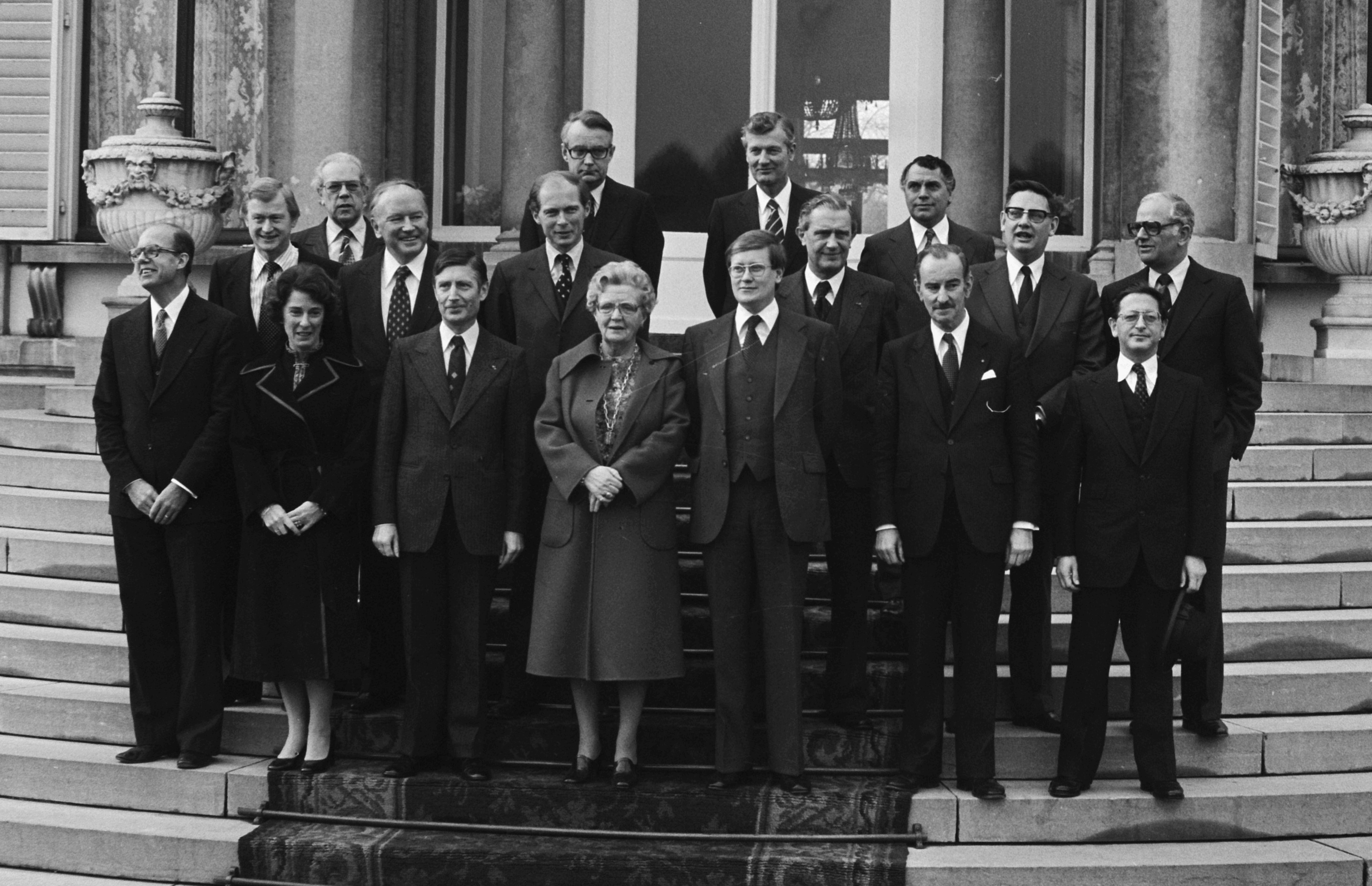 De bordesscène van het kabinet-Van Agt I bij Paleis Soestdijk op 19 december 1977